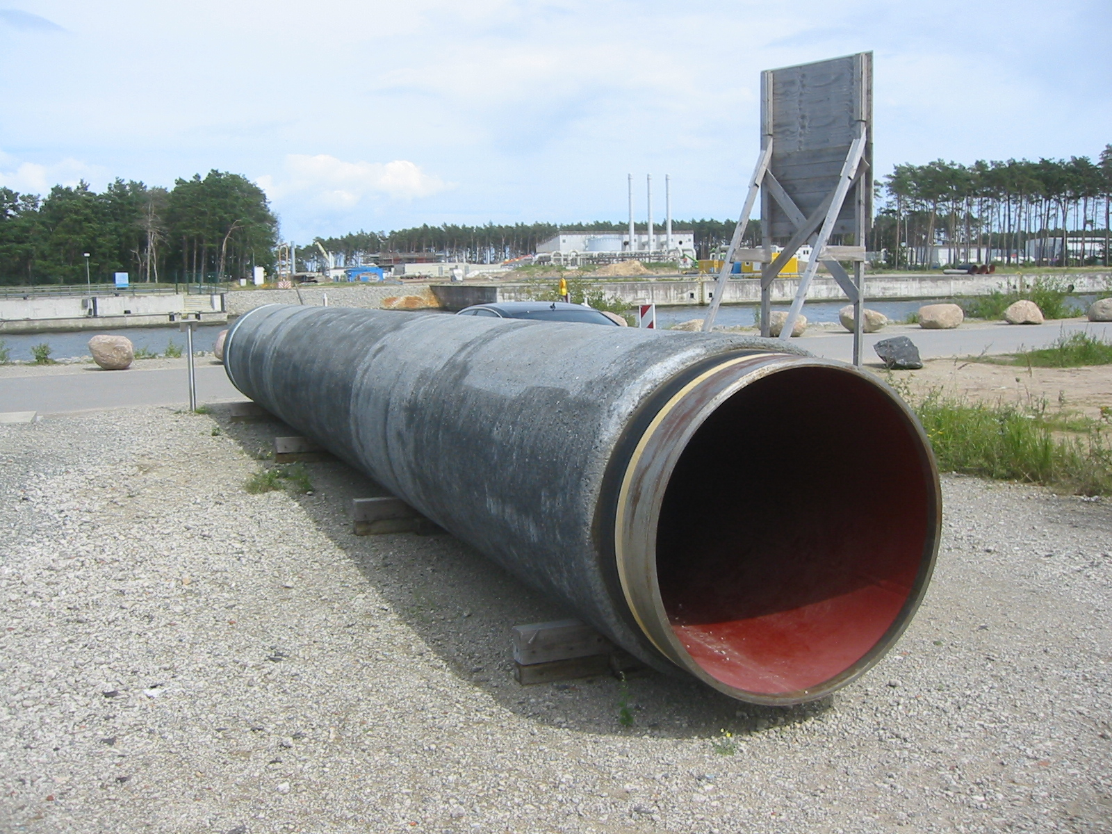 Nord Stream Offshore-Rohr in Lubmin, einer Gemeinde im Landkreis Ostvorpommern. Die Rohrleitung befindet sich neben einem Informationsstand in der Marina Lubmin, der über den Bau der Pipeline informiert.